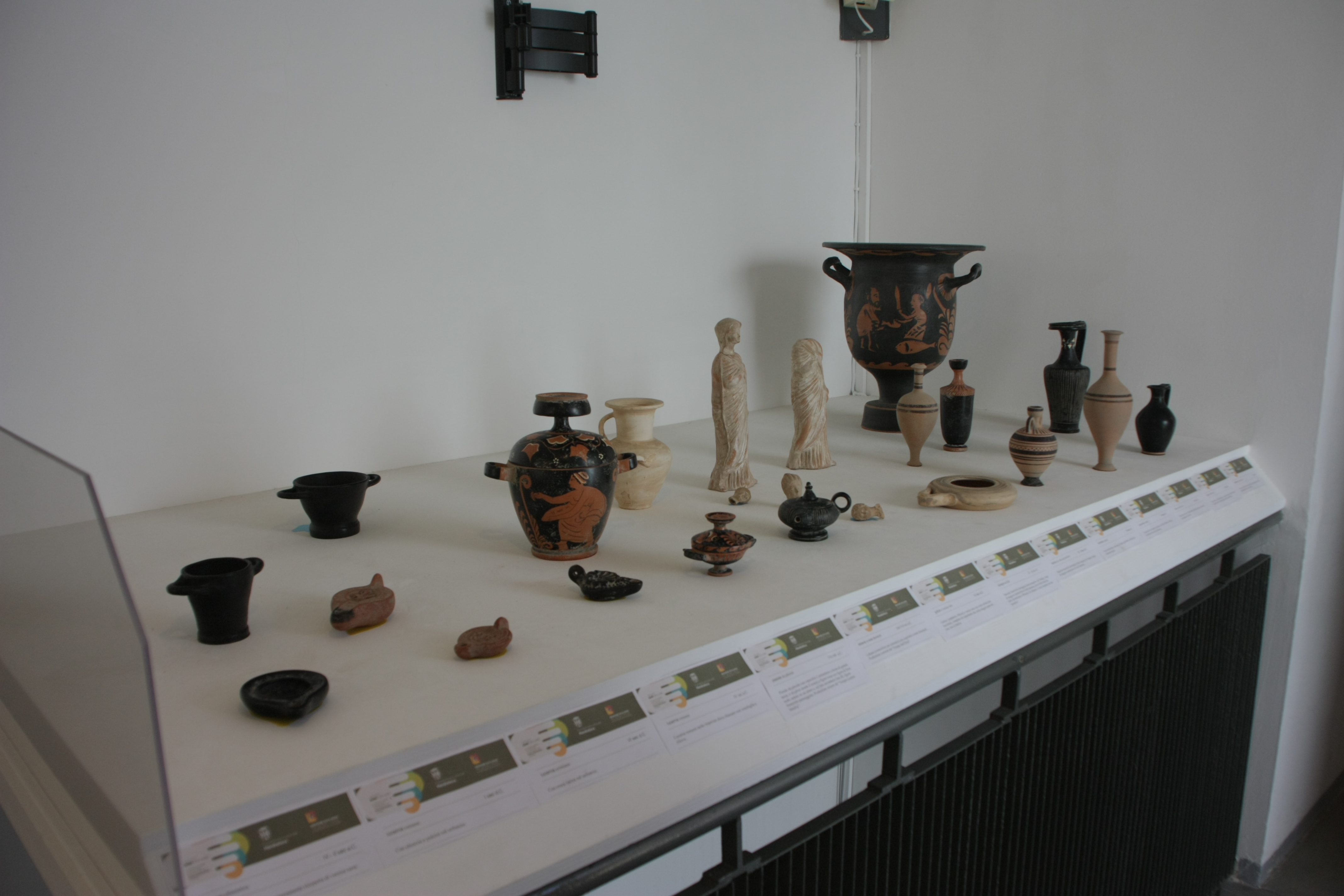 Vasi museo Mandralisca